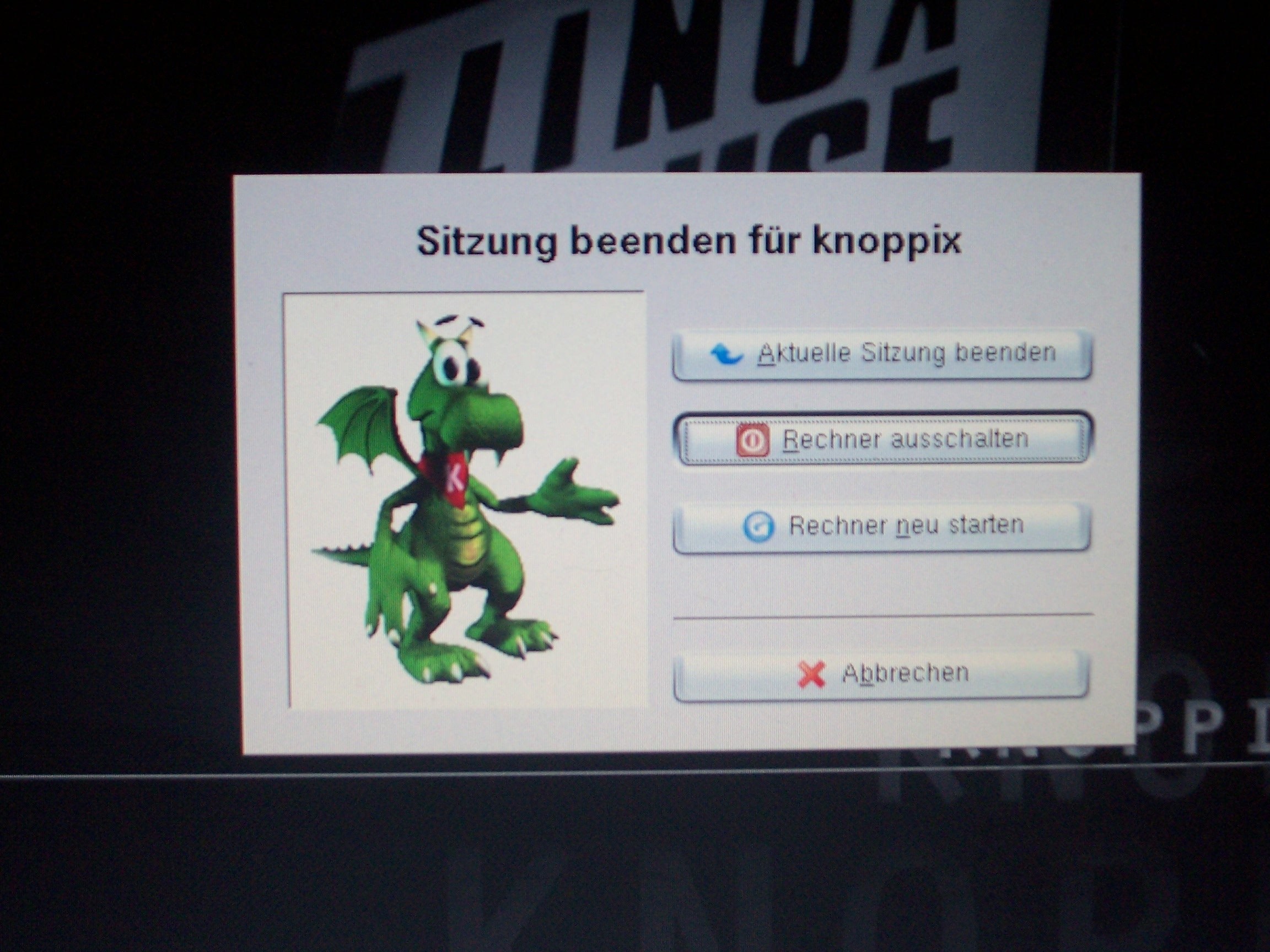 Herunterfahren-Bildschirm bei Knoppix